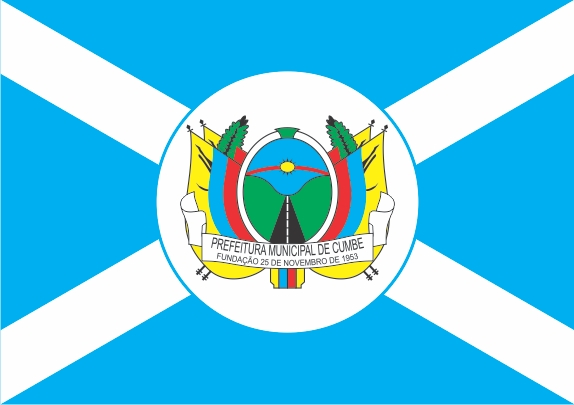 Bandeira municipal de Cumbe-SE